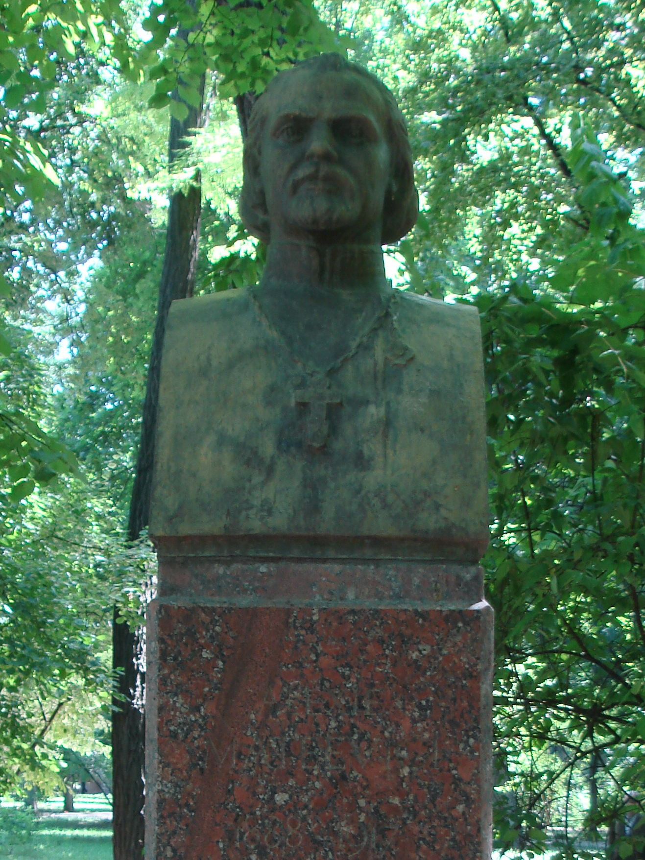 Бюст Алексея Матеевича на Аллее Классиков